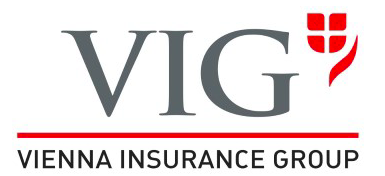 VIG logo